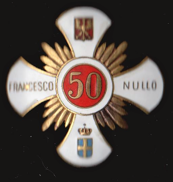 Odznaka 50 Pułk Piechoty Strzelców Kresowych im. FRANCESCO NULLO